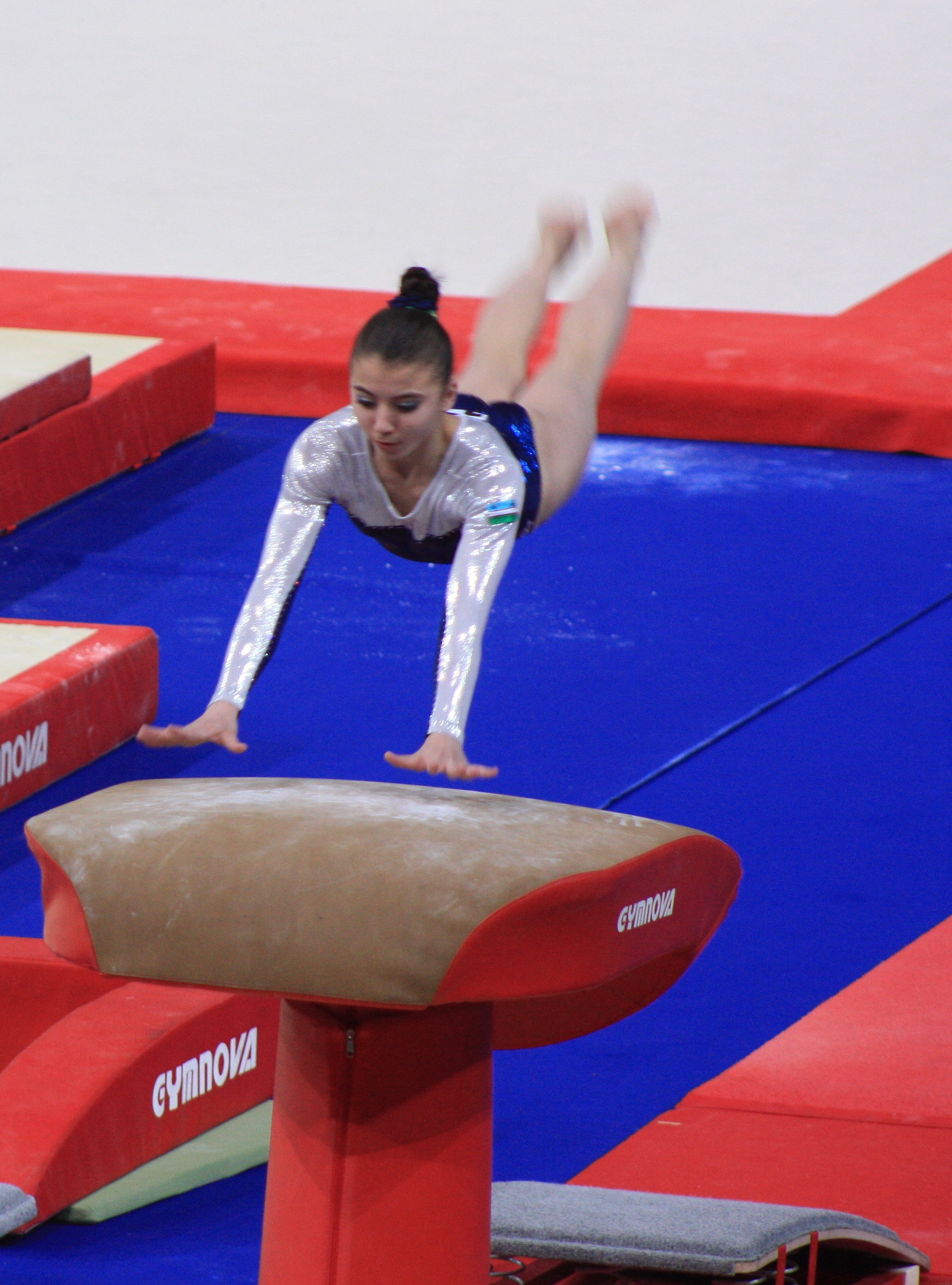 Irina Volodchenko en qualifications du saut aux Internationaux de France (2010).